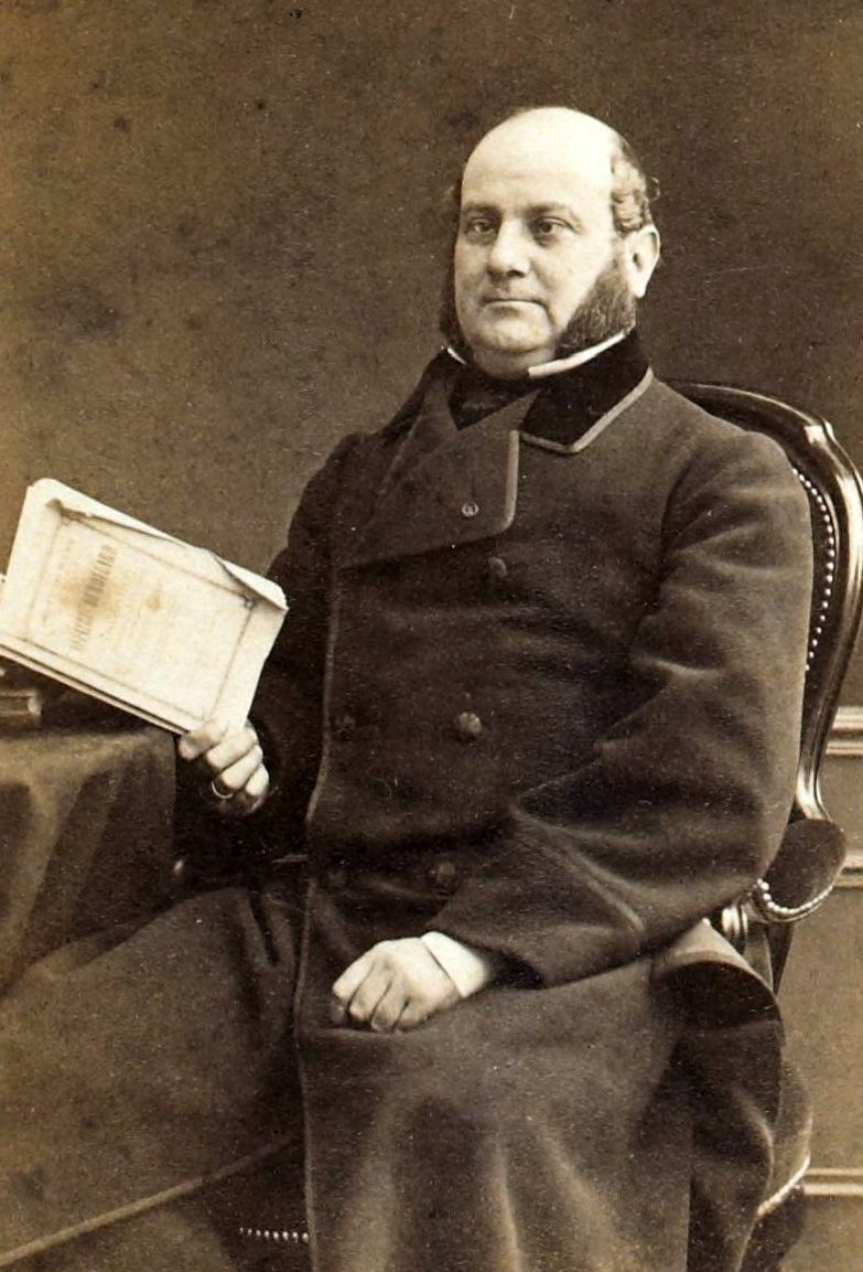 Lardière, défenseur de Dumollard.